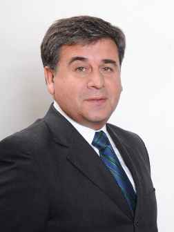 Diputado de la República de Chile, Romilio Gutiérrez.